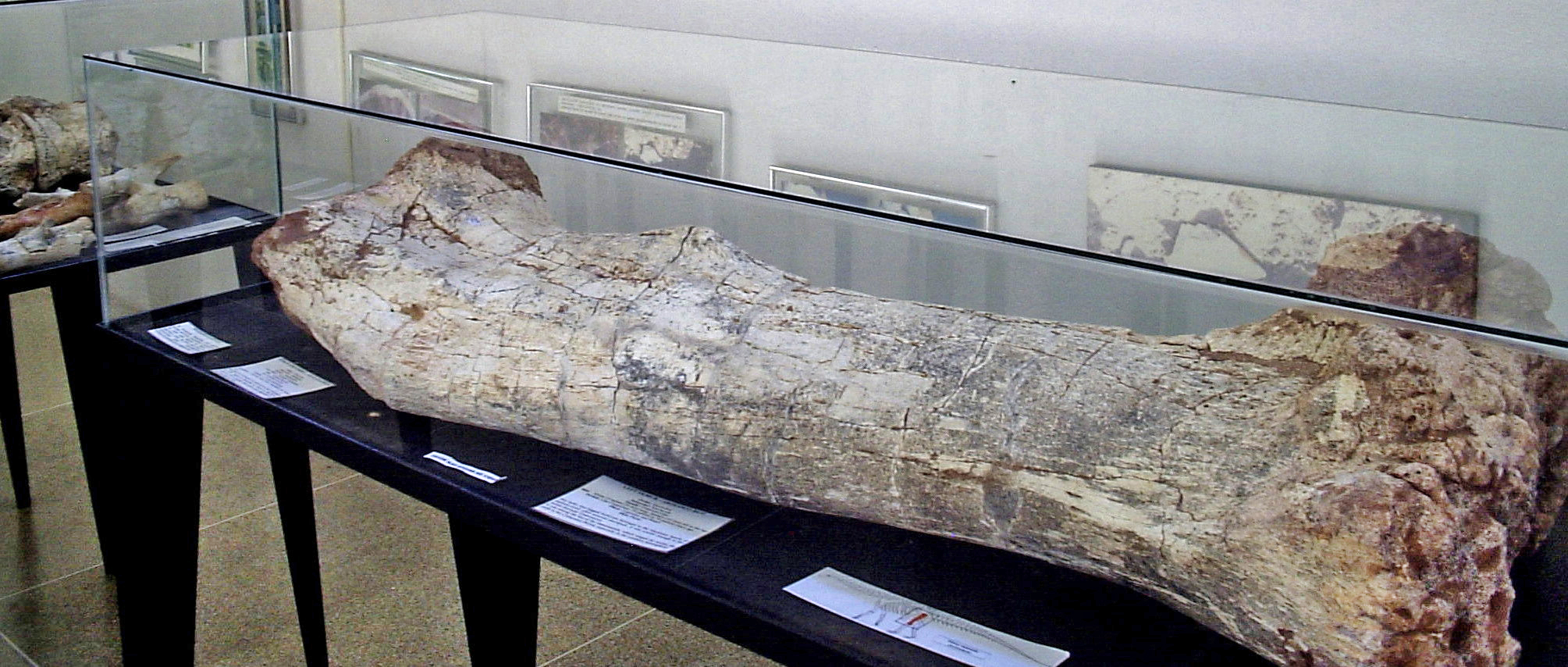 Fêmur de Aeolossauro - titanossauridae - Período Cretáceo superior +- 75 milhões de anos.